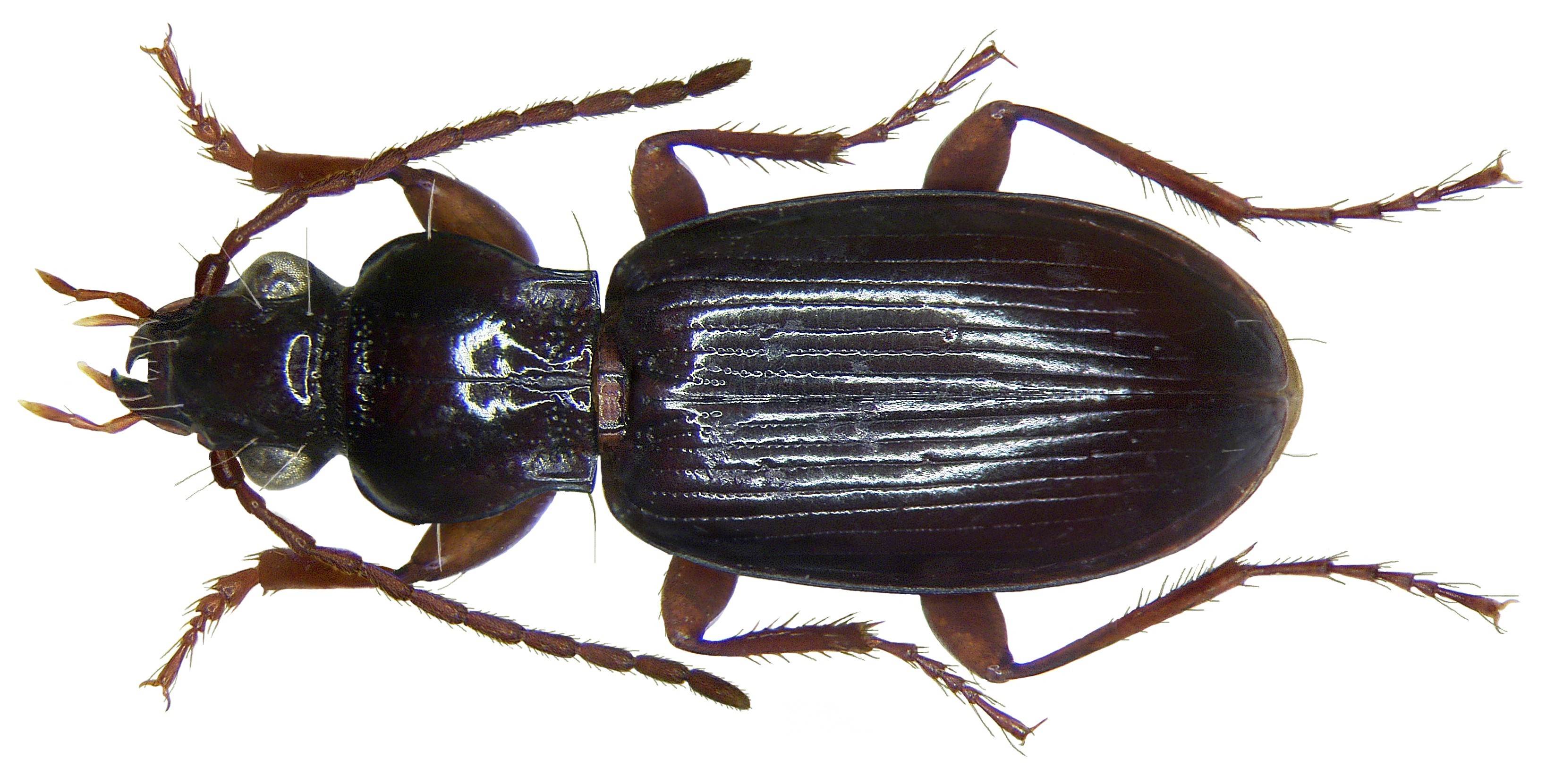 Familie: Carabidae Größe: 7-10 mm Verbreitung: Europa bis Westsibirien Ökologie: besonders in Auwäldern Fundort: Germania, Niedersachsen, Hildesheim leg. det. Kuntze, 1959 Foto: U.Schmidt, 2008